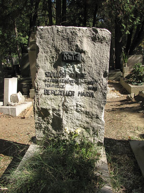 Szőllősi Endre (Budapest, 1911. február 13.–Budapest, 1967. május 27.) szobrász sírja Budapesten. Farkasréti temető: 33/3-2-40.